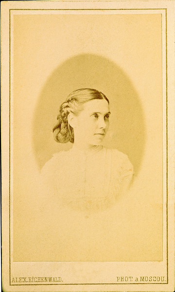 Аполлинария Прокофьевна Суслова (1839-1917/18)